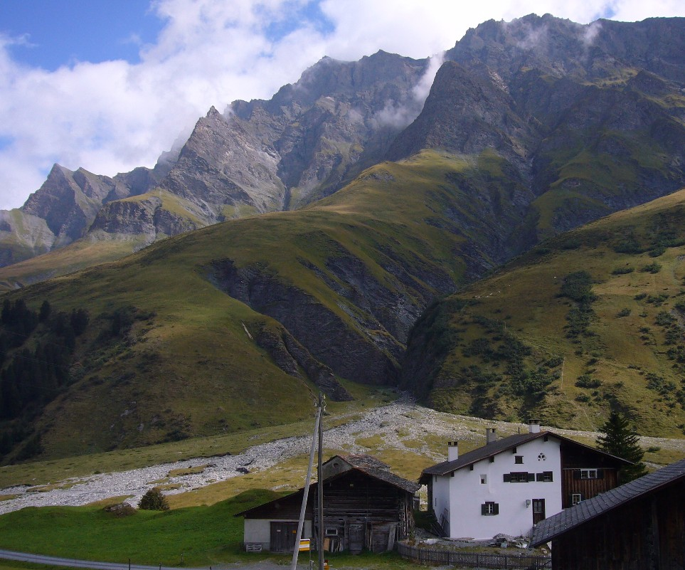 Bruschghorn von Westen; Turrahuus im Safiental